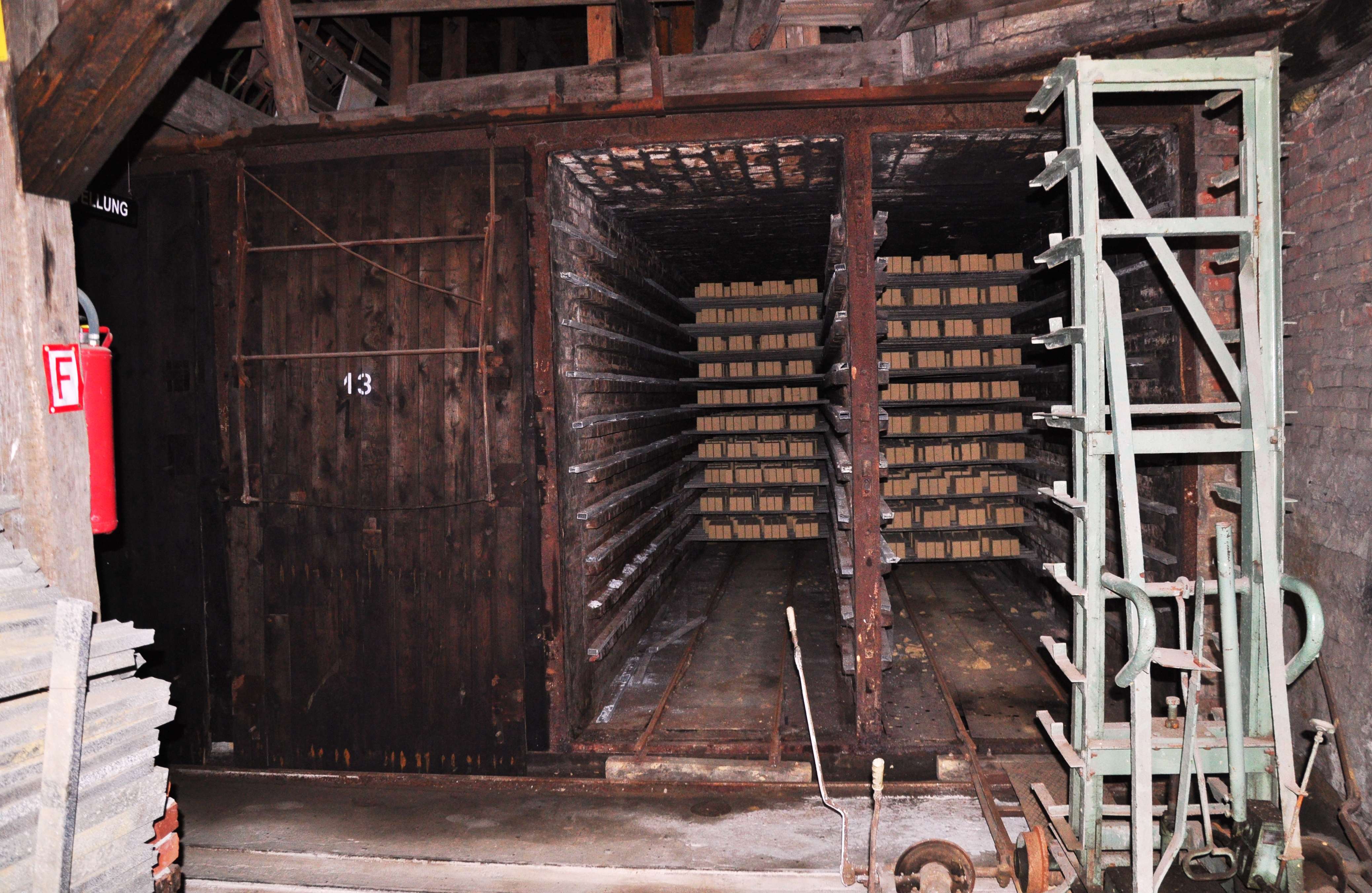 Ziegelei Hundisburg, Brennöfen (Zick-Zack-Verfahren)